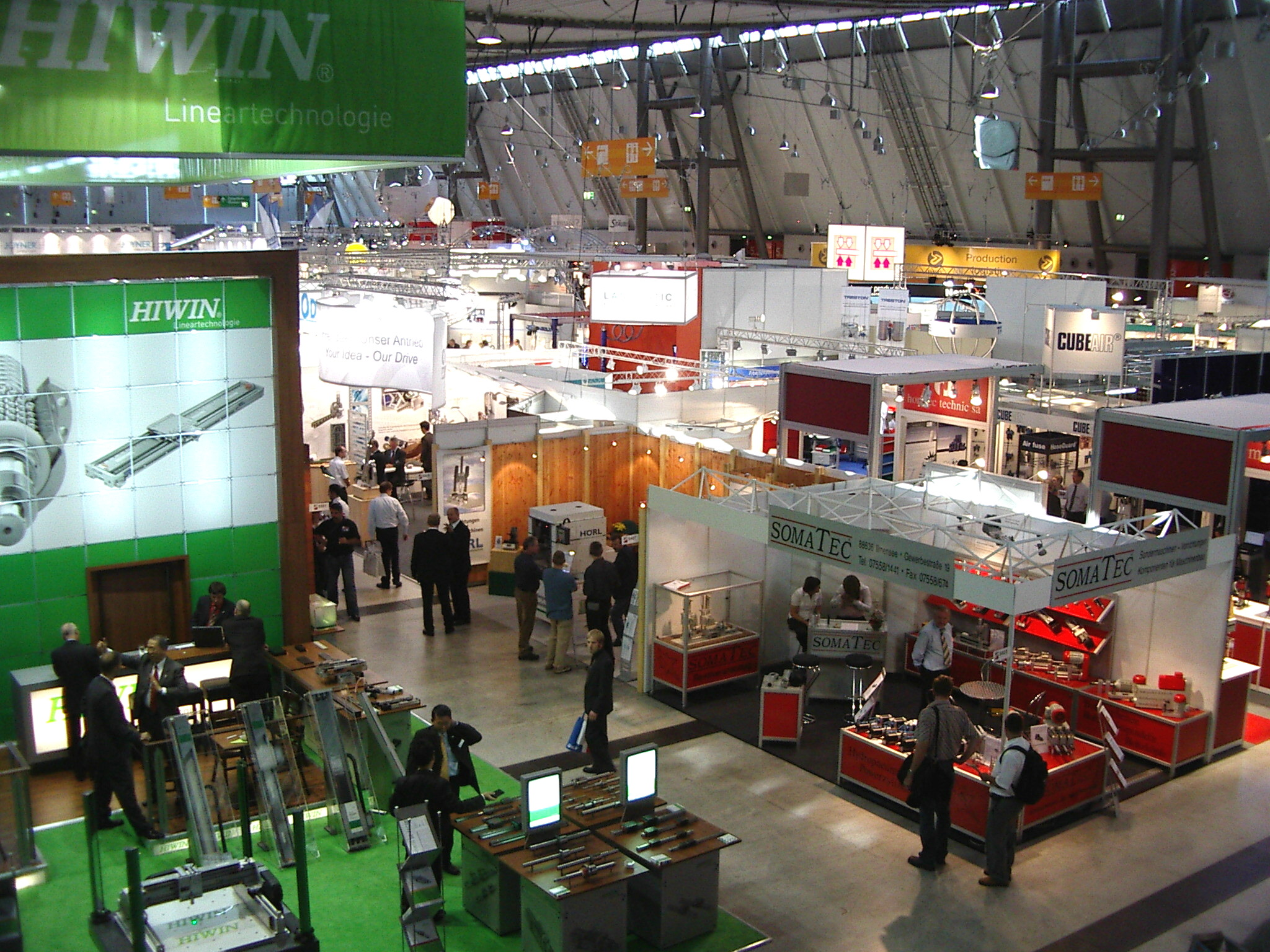 Motek in der Messe Stuttgart, Einblick in einer der Hallen in 2007